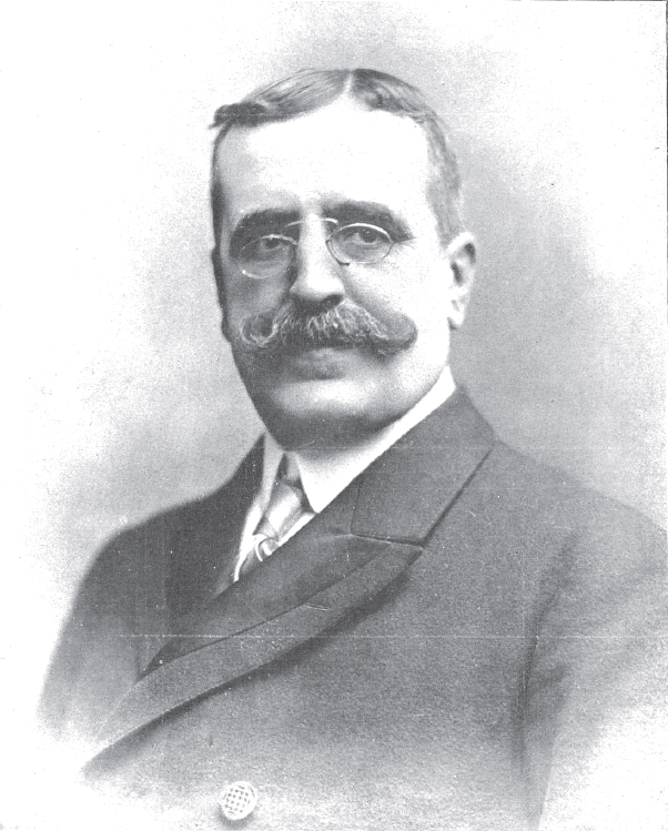 Retrato del político liberal español José Canalejas publicado con motivo de su asesinato en 1912, cuando era Presidente del Consejo de Ministros